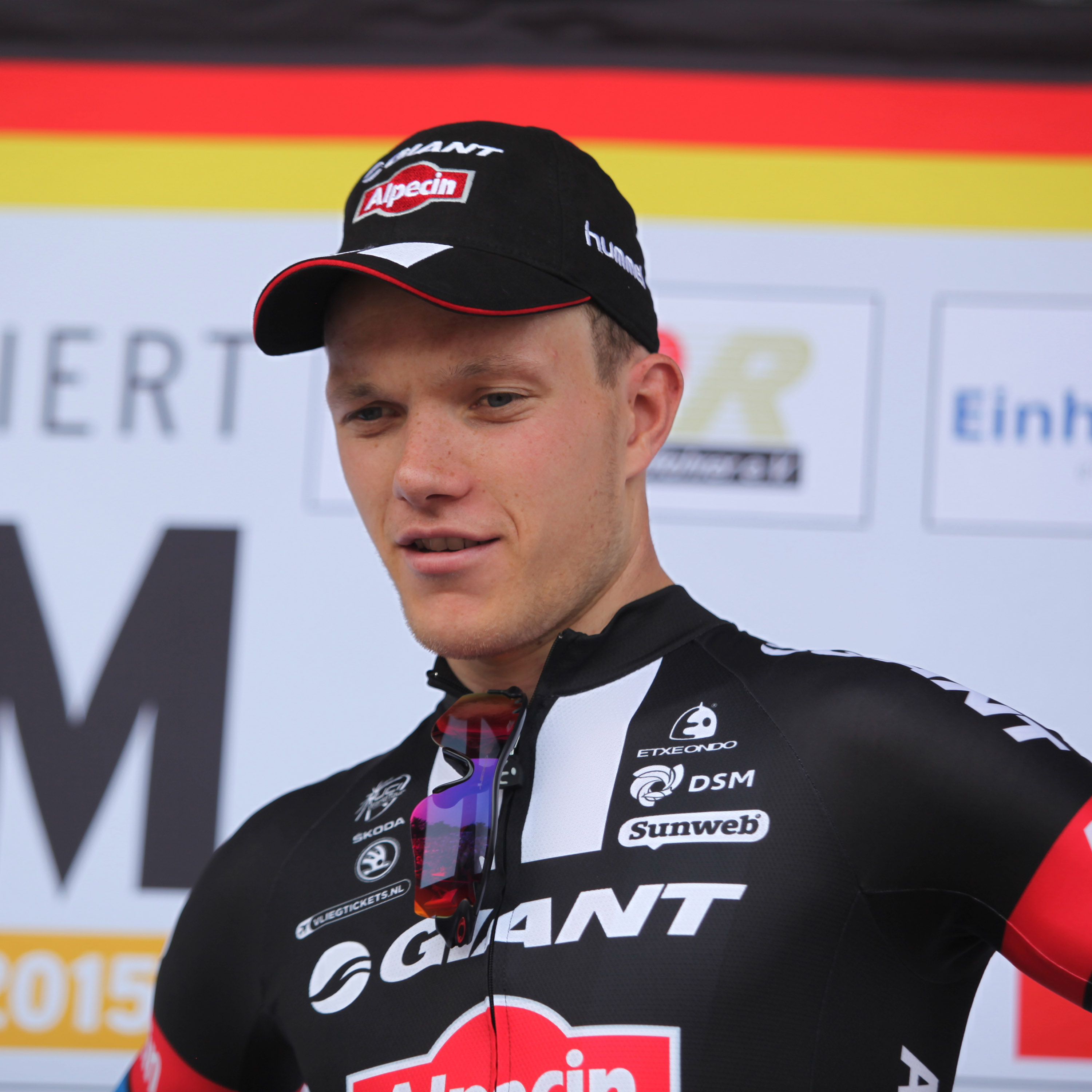 Nikias Arndt bei der Siegerehrung. Foto von den Deutschen Meisterschaften im Straßenrennen der Männer (Elite) am 28. Juni 2015 in Bensheim (Hessen)